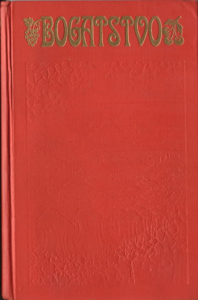 Książka Bogactwo, edycja chorwacka, 1936